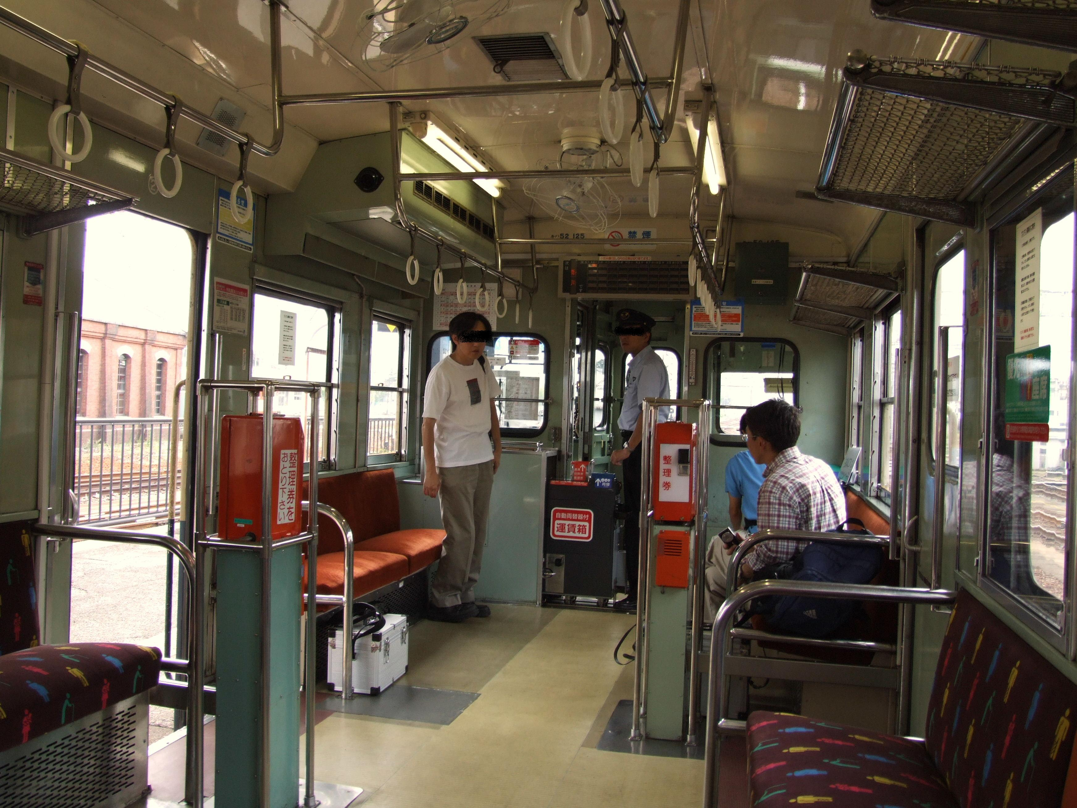 大糸線キハ52形のワンマン装置